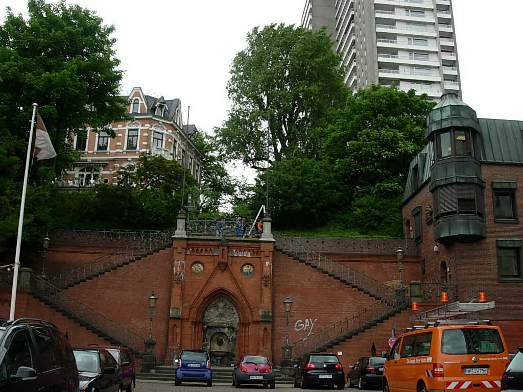 Die Köhlbrandtreppe in Altona-Altstadt wurde 1887 als Verbindung vom Hafen zum Wohngebiet erbaut. This is a photograph of an architectural monument.